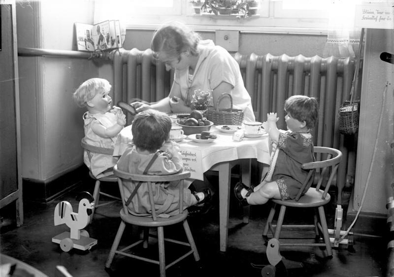 Eine Ausstellung Mutter und Kind im Gesundheitshaus in Berlin-Pankow! Das Gesundheitshaus, das erste dieser Art in Deutschland zeigt eine Ausstellung, die belehrend und erklärend wirken soll für Alle, die diese Ausstellung besuchen. Kinderpuppen in natürlicher Grösse am Kaffeetisch im hellen sonnigen Frühstückszimmer nach dem bekannten Montessori-Kinder-Erziehungs-System.